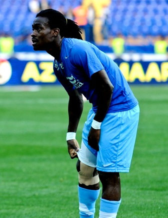 Дерек Боатенг перед матчем с Металлистом